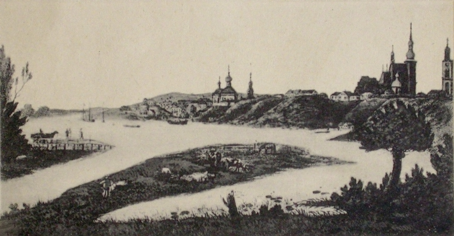 Беларуская (тарашкевіца): Бабруйск (Babrujsk), рака Бярэзіна (Biarezina). Выгляд места да пабудовы расейскай фартэцыі